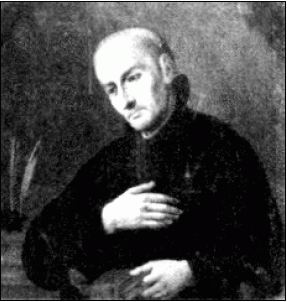 Pintura del misionero Juan de Ugarte.